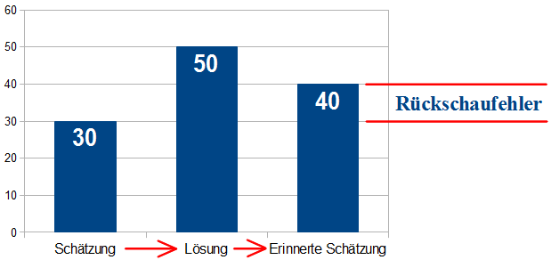 Verbildlichtes Beispiel für den Rückschaufehler